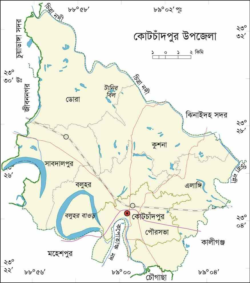 কোটচাঁদপুর উপজেলা ম্যাপ